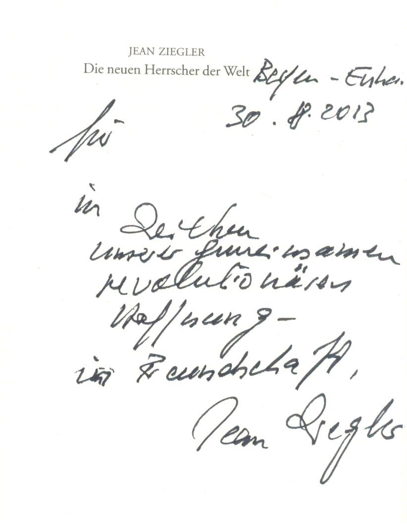 Autograph von Jean Ziegler, 2013 in Ffm-Bergen-Enkheim